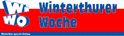 Logo der ehemaligen Zeitung Winterthurer Woche